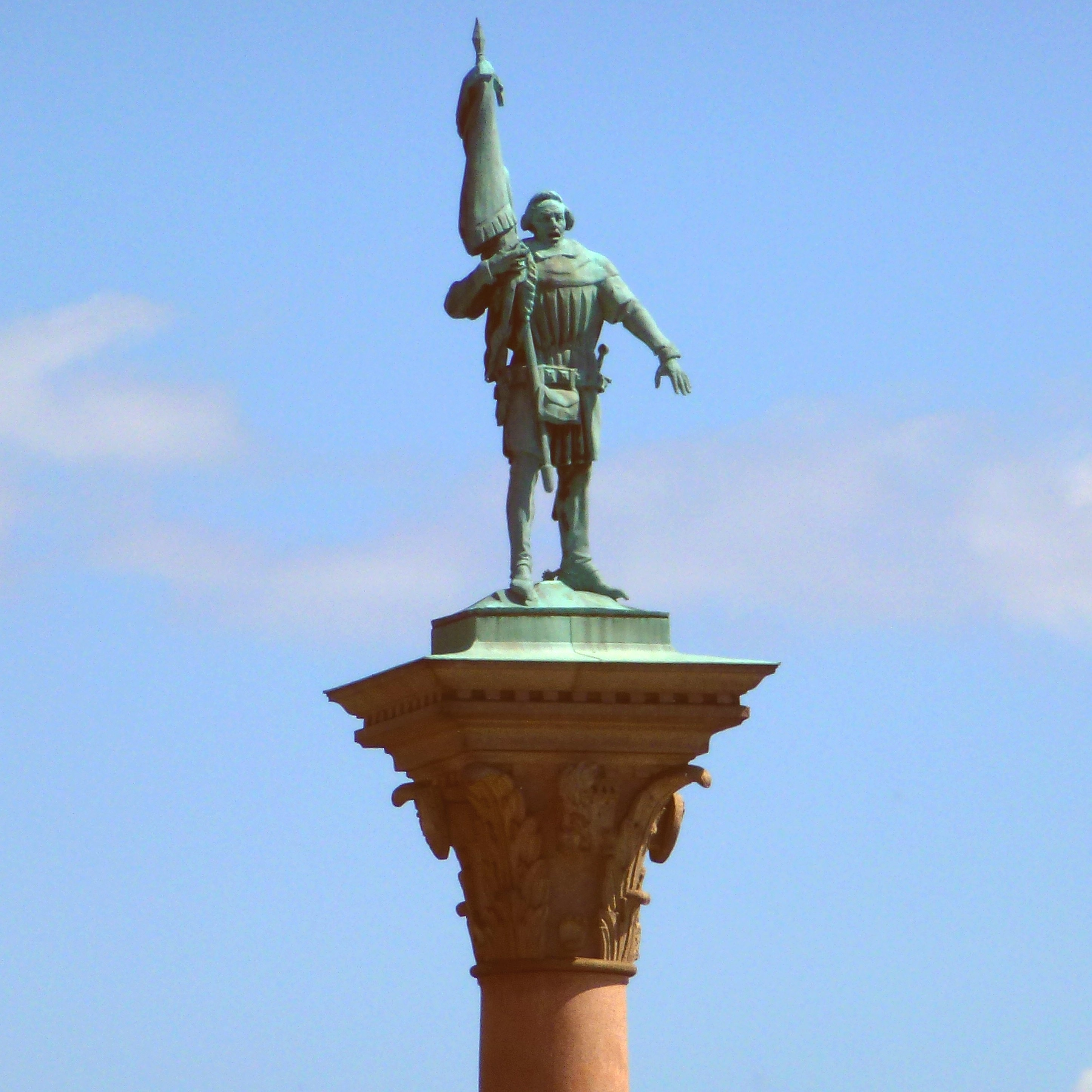 Engelbrektstatyn